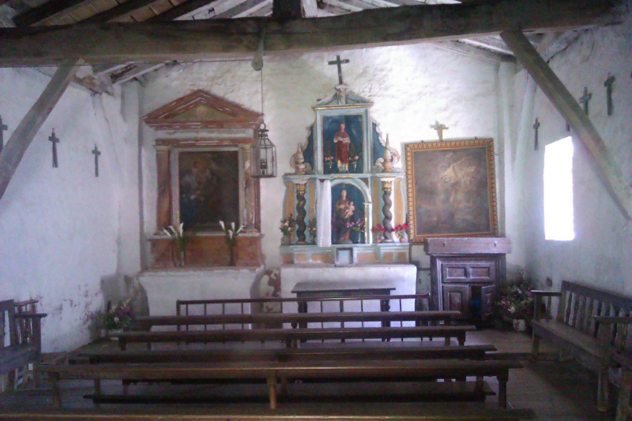 San Bixentiko eliza barrua